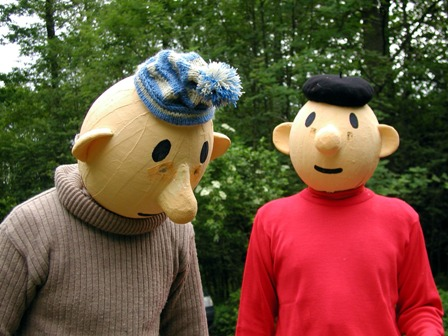 Pohádkový les v Jiříkově